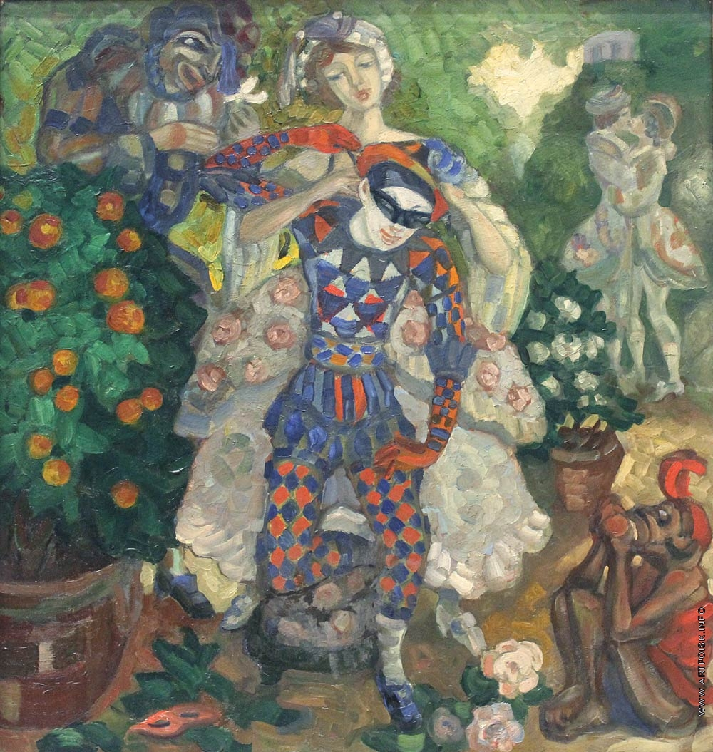 Пантомима Год создания 1914 Материал Картон, масло Собрание Национальный художественный музей Республики Беларусь